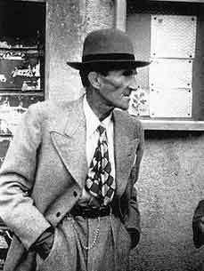 швейцарский художник Луи Суттер (фр. Louis Soutter, 1871 — 1942)